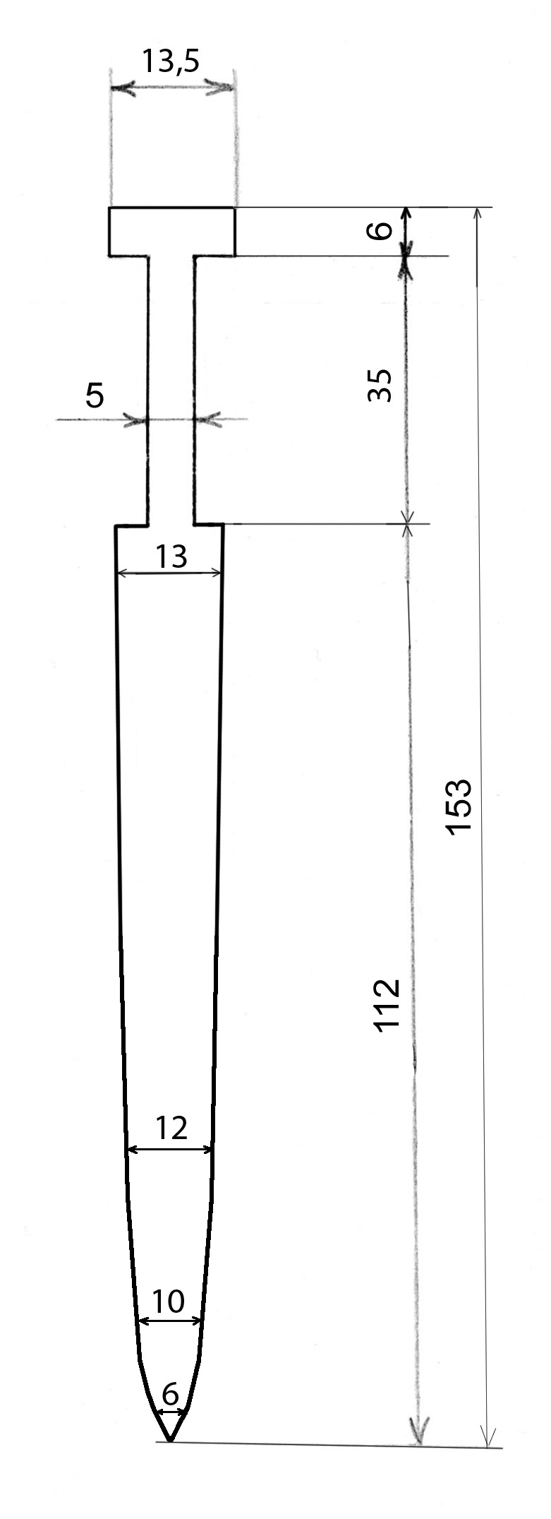 Чертёж коклюшки для кружевоплетения (вариант).